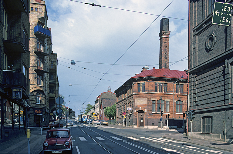 Badet vid korsningen av Karl Johansgatan och Djurgårdsgatan, invigt 1892. Bilden troligen från 1970-talet. Kategori: Badhus, Stadsmiljö